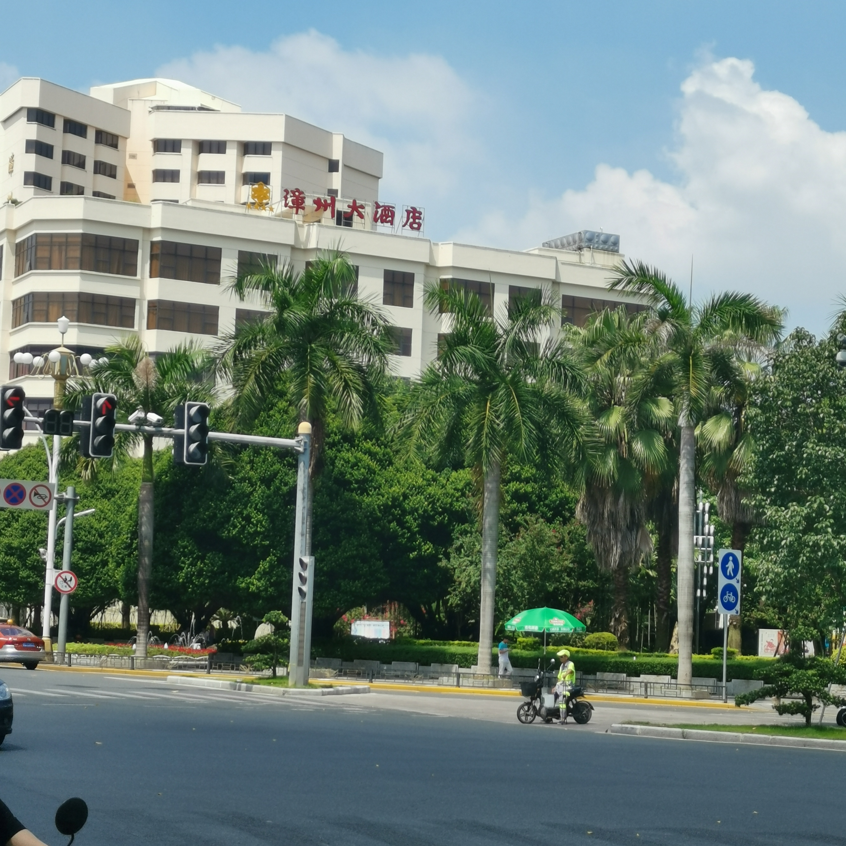 胜利西路漳州大酒店